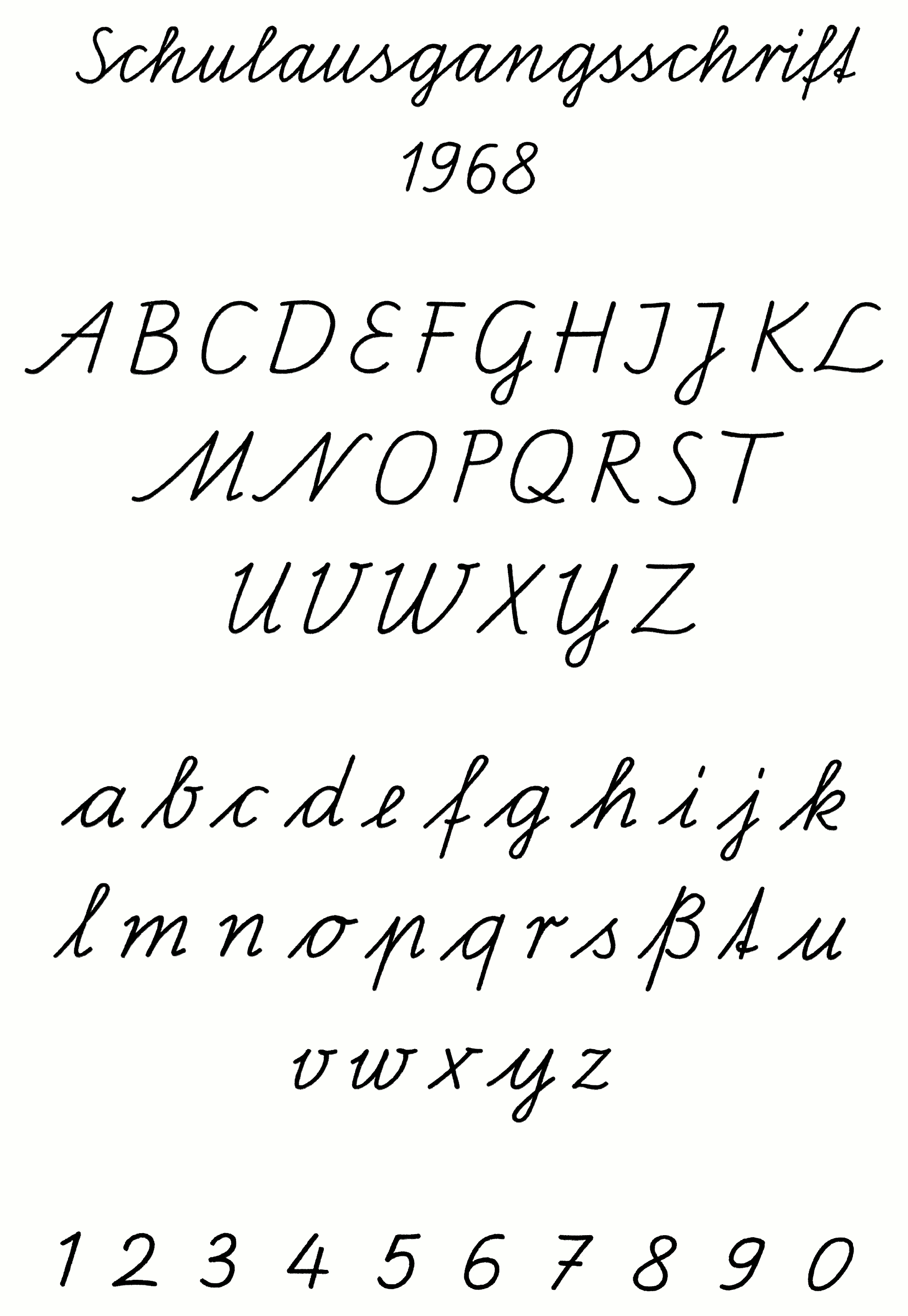 Alphabet der Schulausgangsschrift 1968